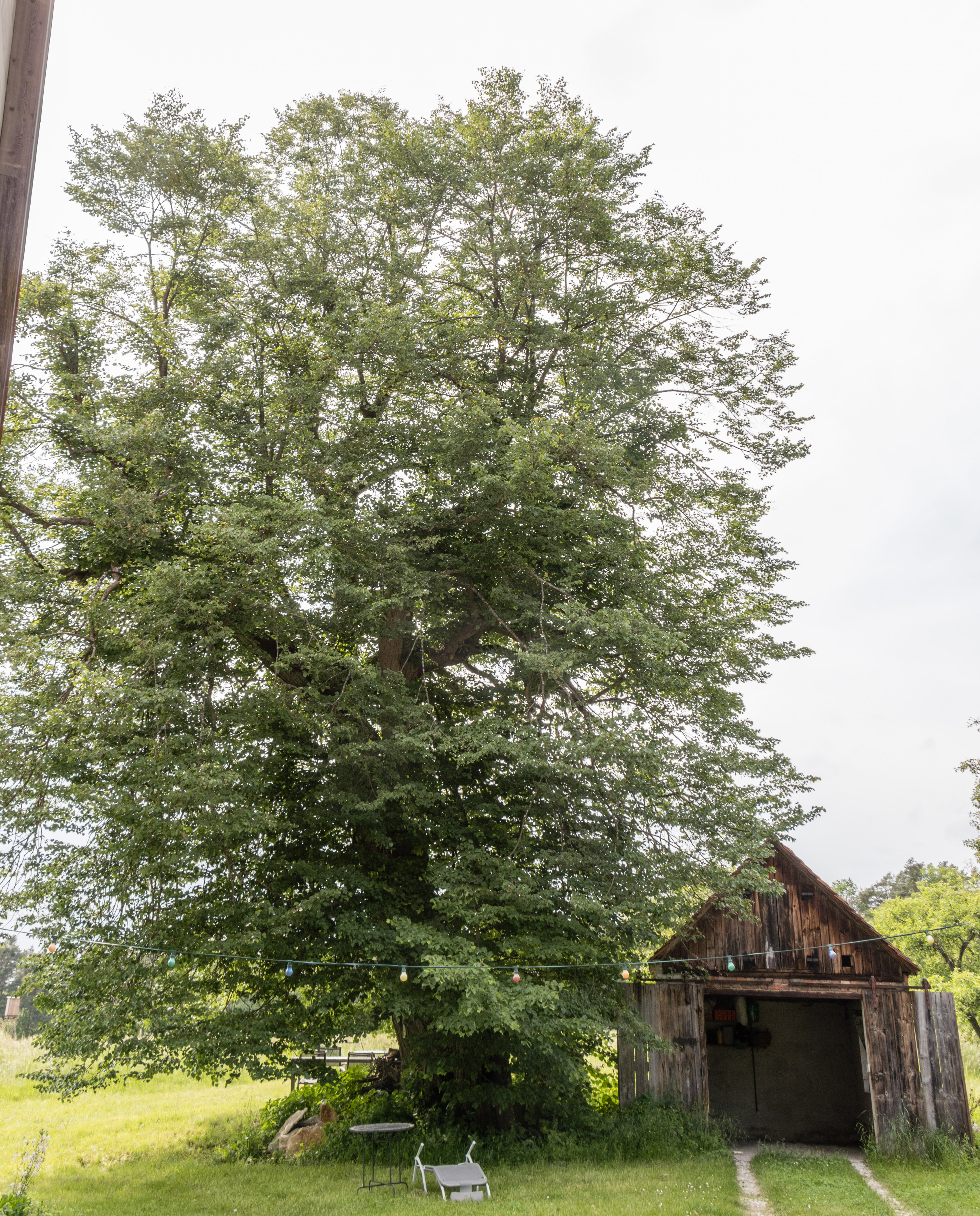 Linde Mauschelhof, Naturdenkmal